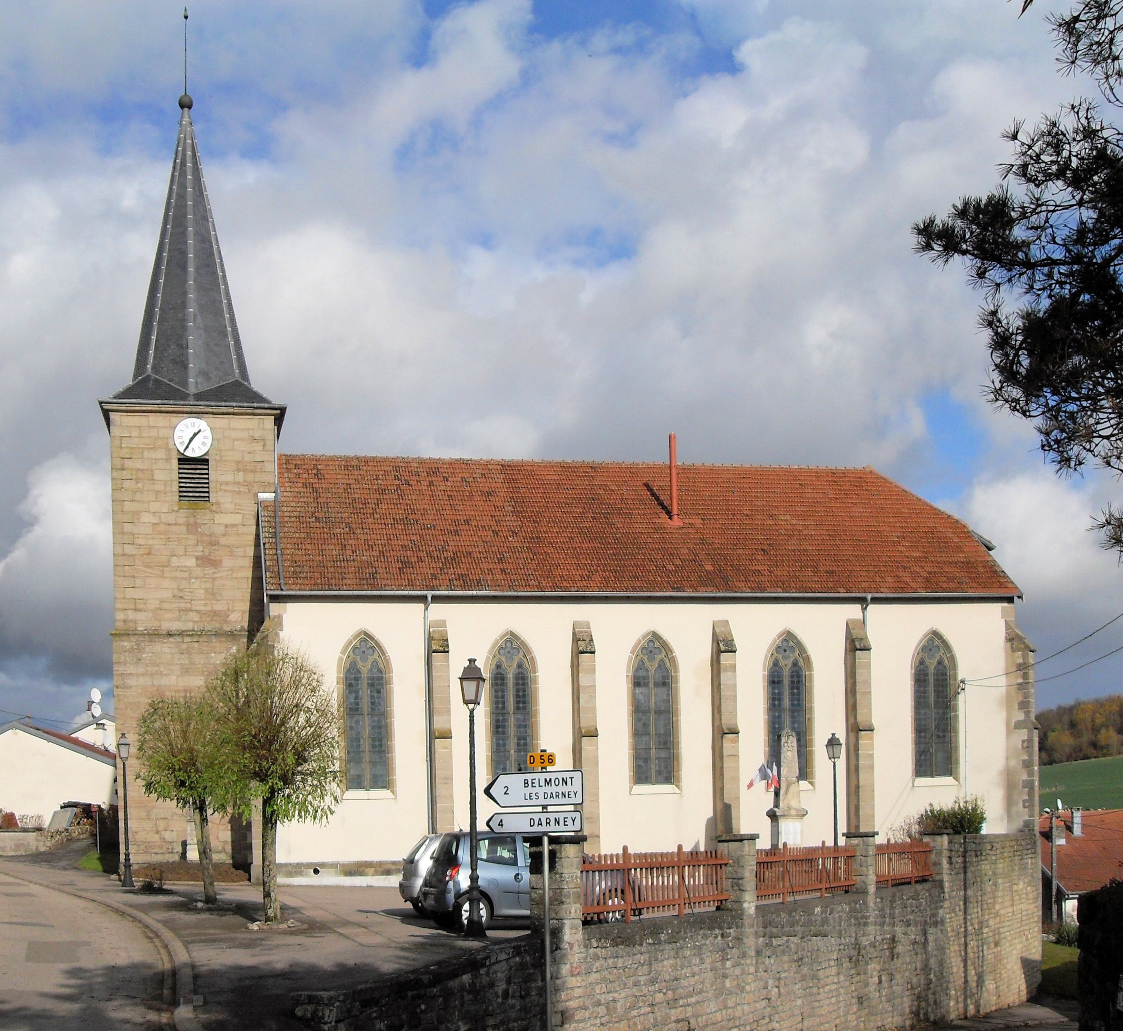 L'église Sainte-Catherine à Nonville